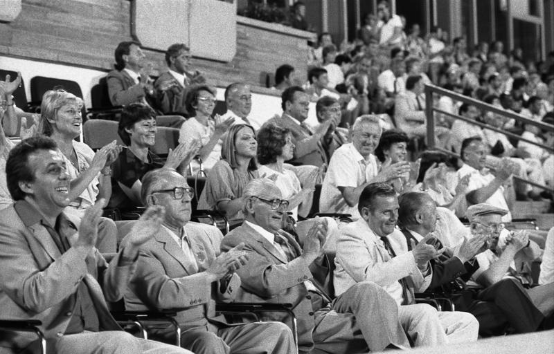 ADN-ZB/Kluge 1.8.83 Leipzig: Sportfest 83 - Abschluß Bei der Abschlußveranstaltung des VII. Turn- und Sportfestes swie der IX. Kinder- und Jugendspartakiade hatten in der Ehrenloge des Zentralstadions platzgenommen: v.l.n.r.: Egon Krenz, Kandidat des Politbüros des ZK der SED und 1. Sekretär des Zentralrates der FDJ; Erich Mielke, Mitglied des Politbüros des ZK der SED und Minister für Staatssicherheit der DDR; Paul Verner, Mitglied des Politbüros des ZK der SED und Sekretär des ZK der SED; Manfred Ewald, Präsident des DTSB und des NOK der DDR; Juan Antonio Samaranch, Präsident des IOC, und Erich Mückenberger, Mitglied des Politbüros des ZK der SED und Präsident der Gesellschaft für Deutsch-Sowjetische Freundschaft.